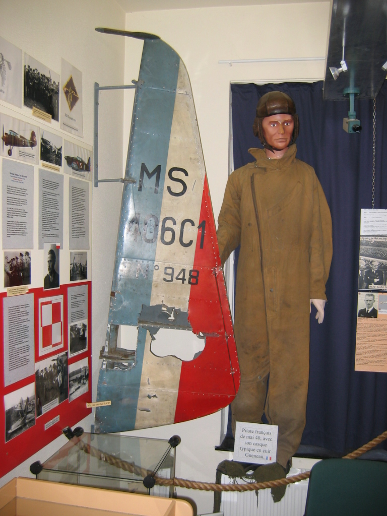 Empennage de MS406